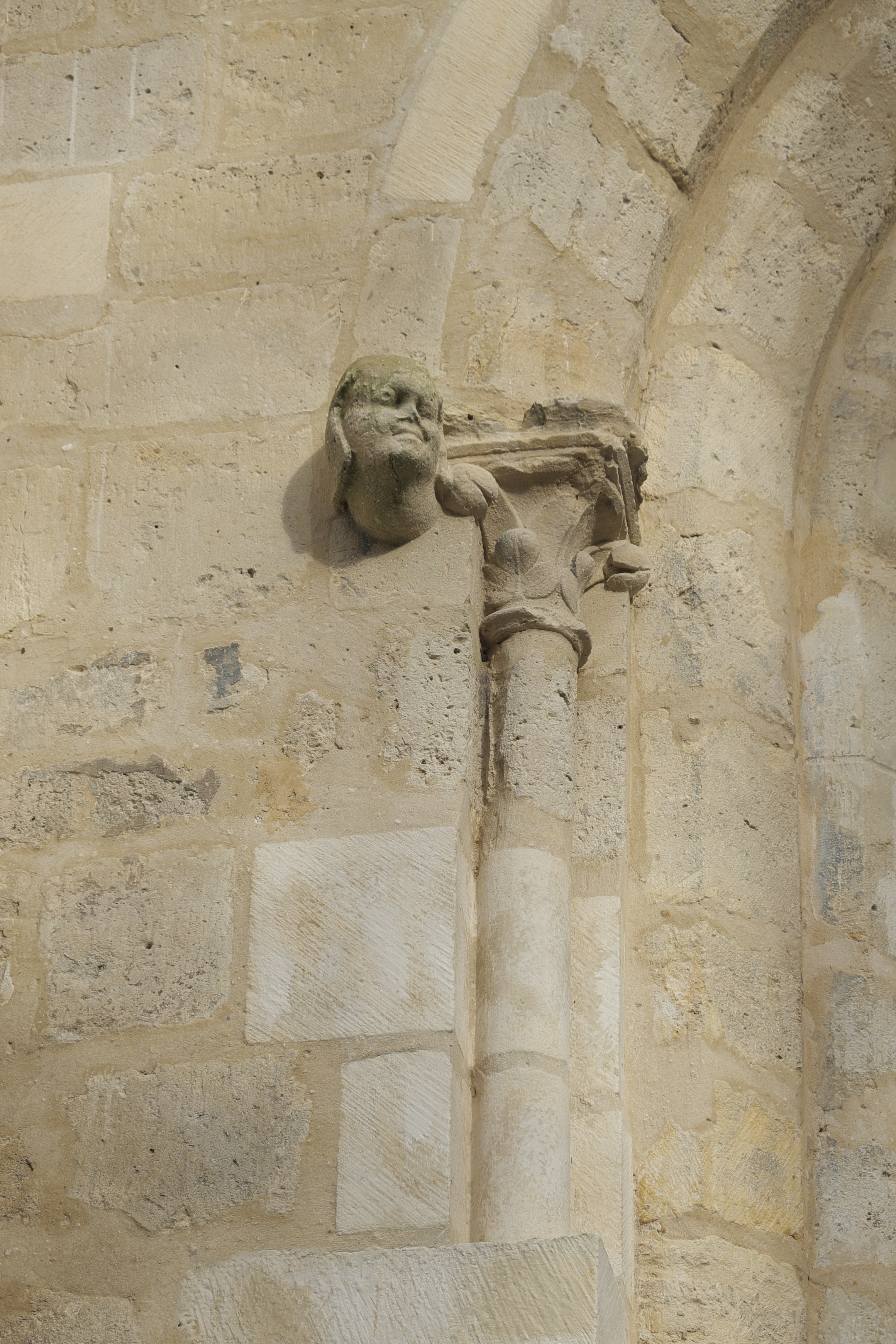 Katholische Pfarrkirche Saint-Martin in Longjumeau im Département Essonne (Île-de-France/Frankreich), Kapitell und Konsole an einem Fenster